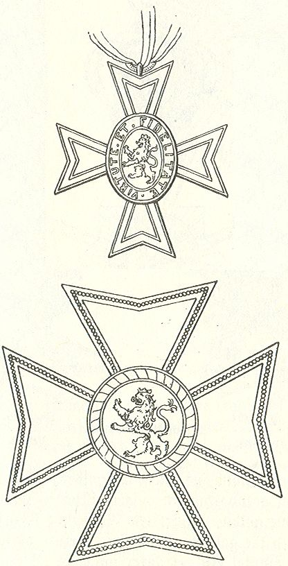 Scan van Blz. 144 van het boek "Handbuch der Ritter- und Verdienstorden " uitgegeven 1893 door Weber.Tekening van de in 1902 overleden Maximilian Gritzner. Robert Prummel 10 jul 2008 16:40 (CEST)